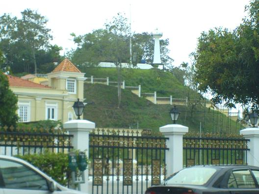 Gambar Bukit Puteri yang diambil pada tahun 2006.